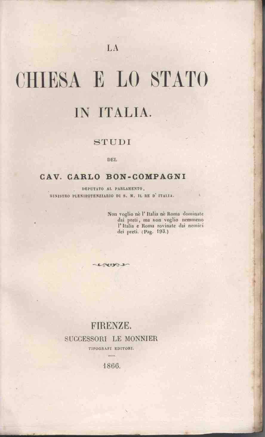 Frontespizio del volume La chiesa e lo stato di Carlo Boncompagni, edito a Firenze nel 1866.